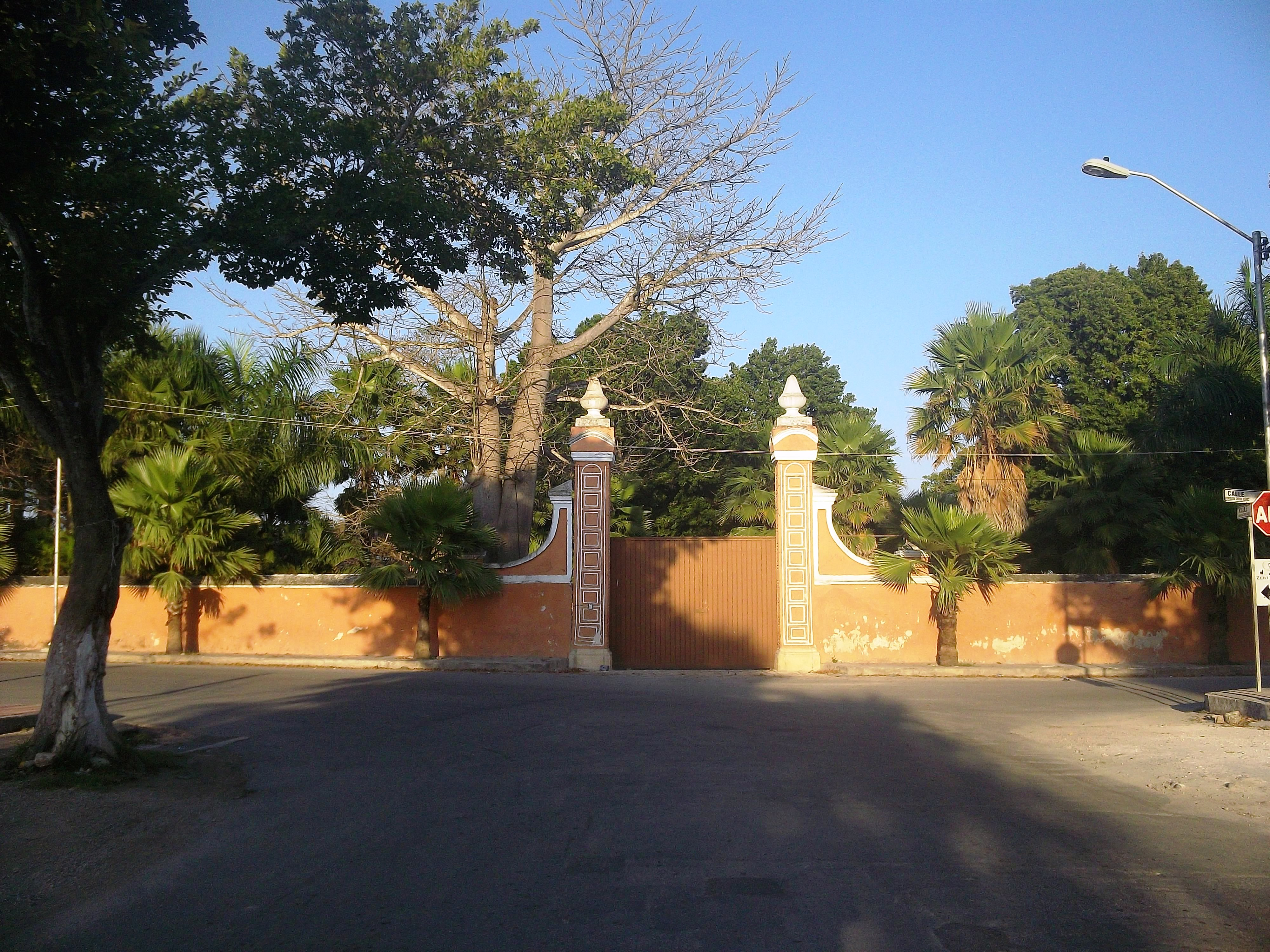 Entrada de la Hacienda de Chichí Suárez, Yucatán.